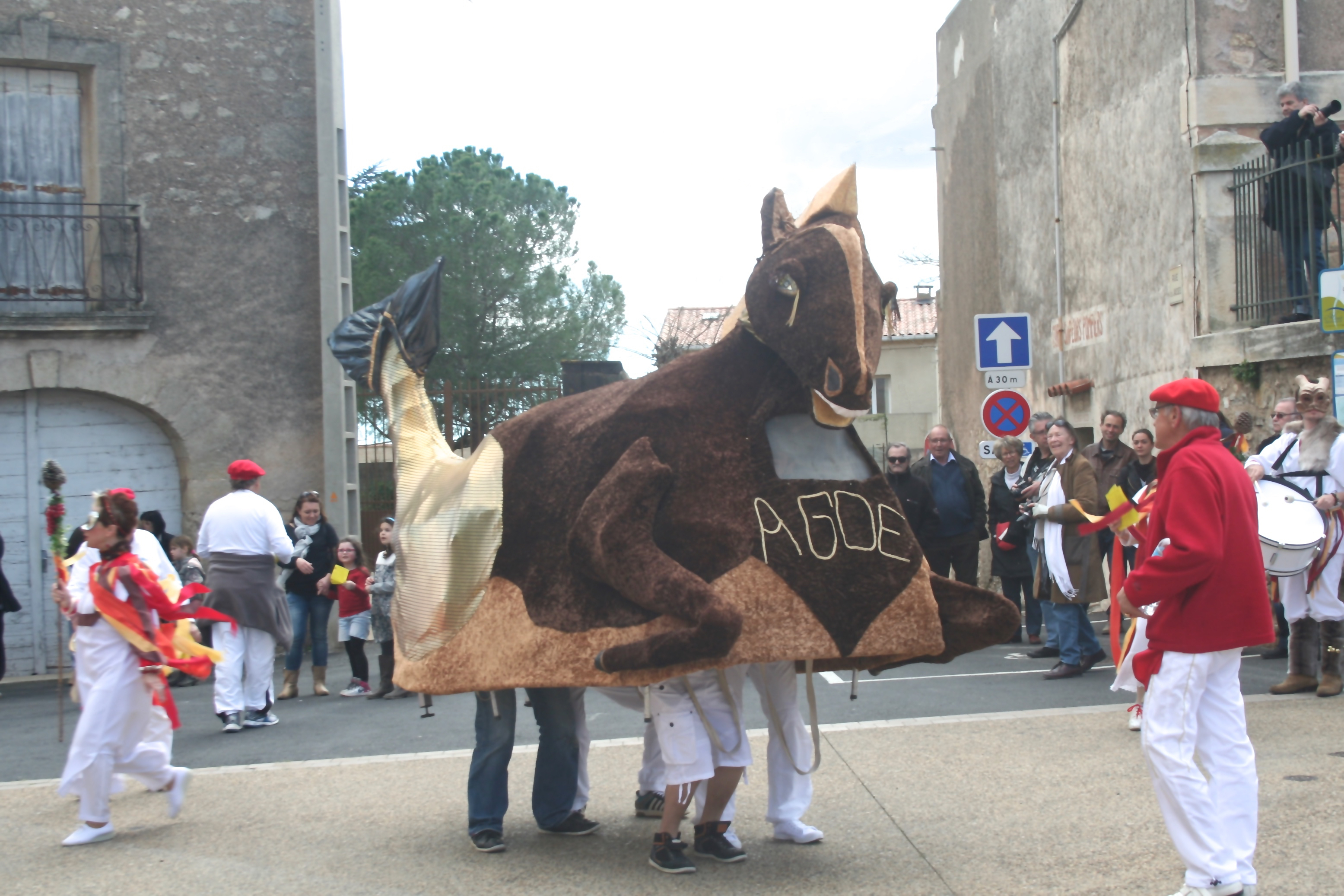 Agde (Hérault) - le Cheval marin (animal totémique d'Agde) de sortie à Castelnau-de-Guers